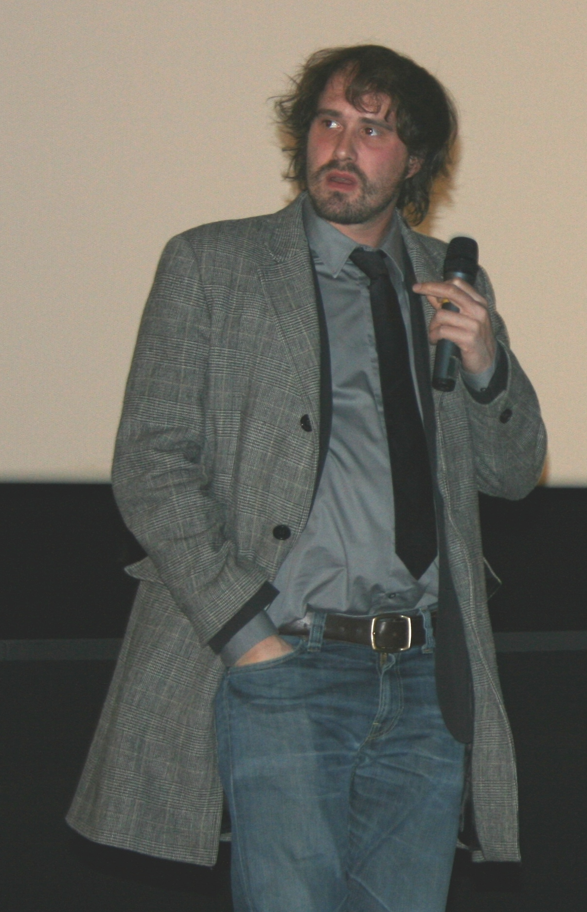 David Moreau à l'avant-première de The Eye diffusée à l'UGC Ciné Cité La Défense, à Puteaux.